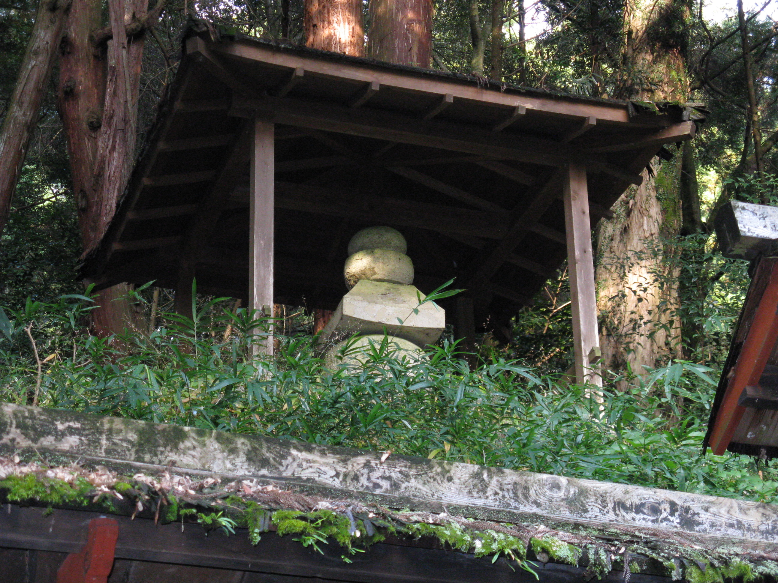 観心寺 道興大師御廟